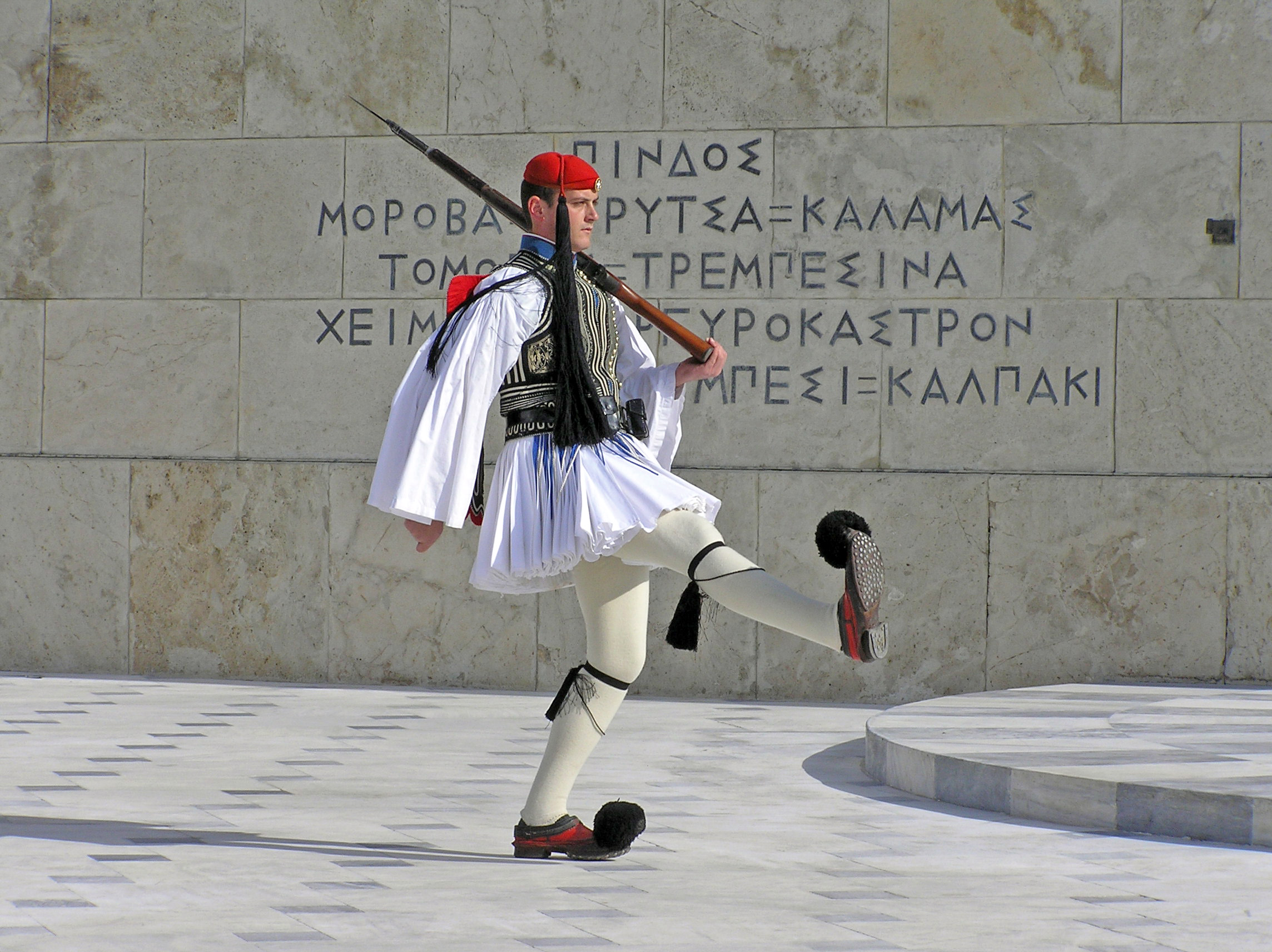 Греческие гвардейцы Эвзоны